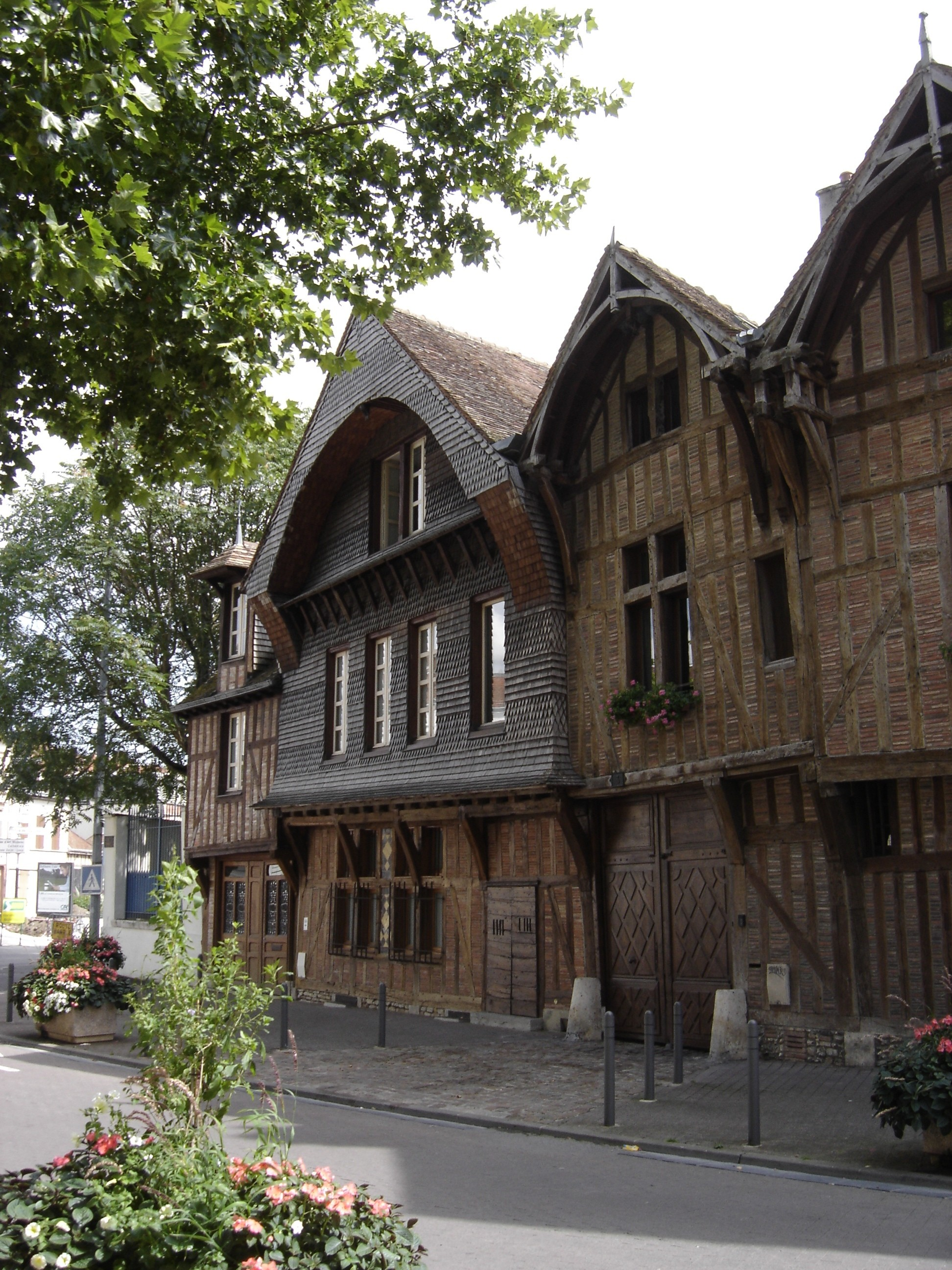 Maisons à colombage à Troyes (Aube - France)